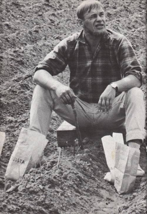 Suomalainen viihdetaiteilija, koomikko, näyttelijä, käsikirjoittaja, elokuvaohjaaja, tuottaja, lauluntekijä ja keksijä Pertti "Spede" Pasanen (1930–2001) vuonna 1964 "Maalaispoika Kallena" (X-Paroni).